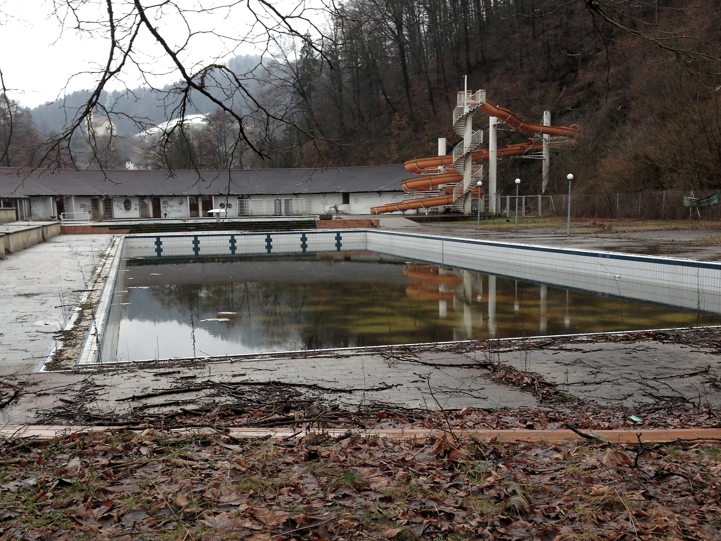 Zunanje kopališče medijskih toplic pred očiščevalnimi akcijami civilne iniciative aprila 2013.